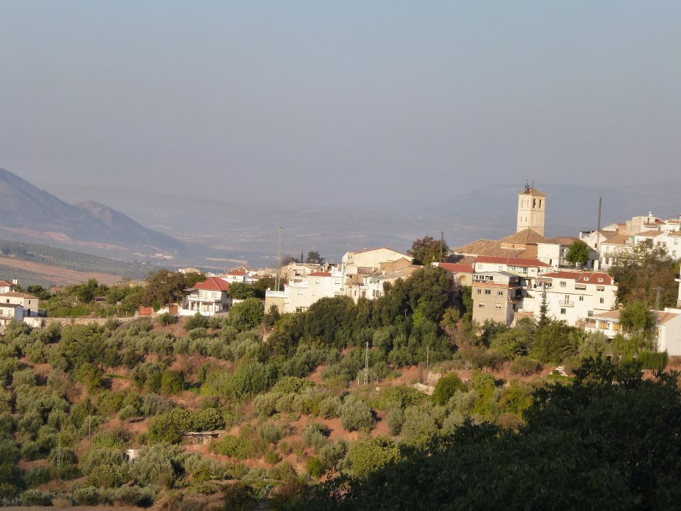 Cogollos Vega, Granada (España)